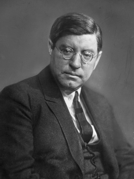 portrett, mann, forfatter, sittende halvfigur.